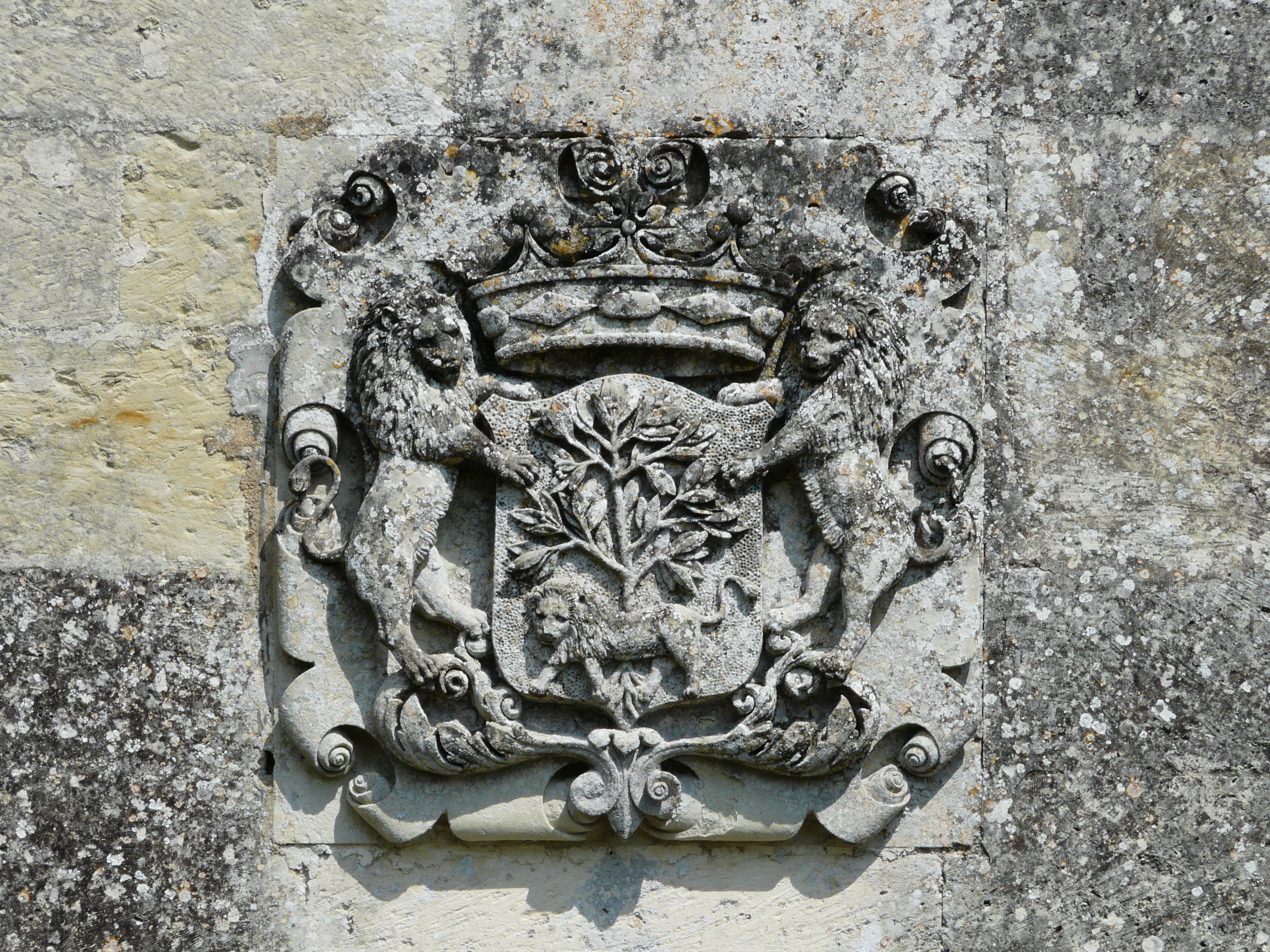 Armoiries de la famille du Lau, au-dessus du portail du château de Montardy, Grand-Brassac, Dordogne, France.